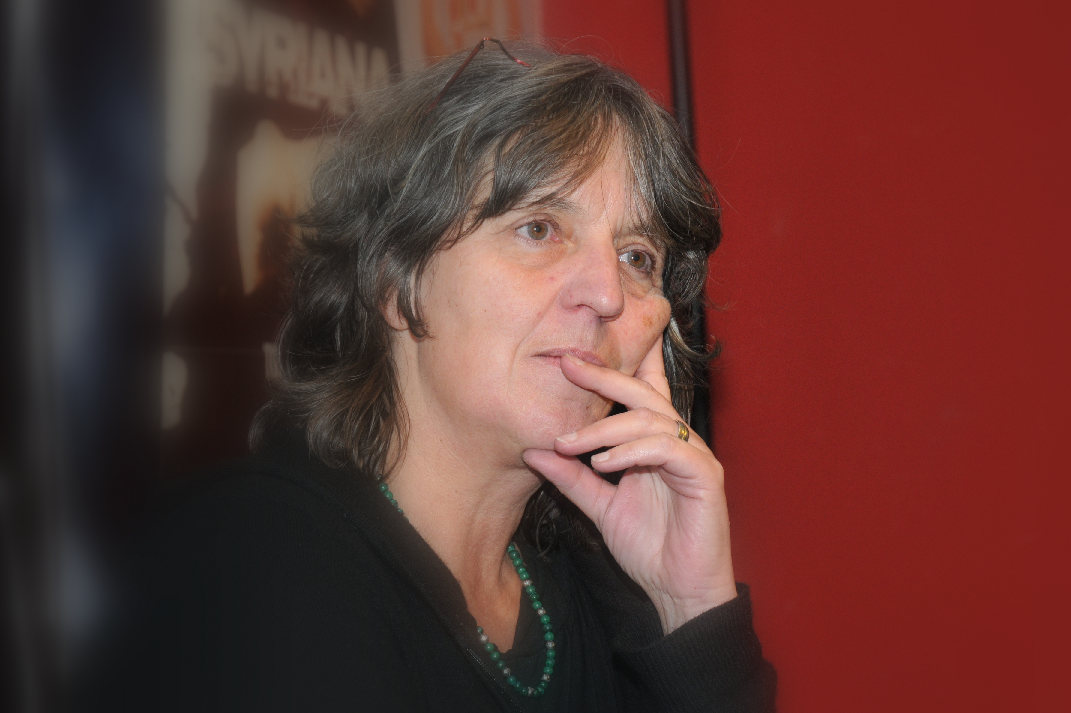 Déi däitsch Regisseurin Lorettta Walz bei der Virstellung vun hirem Film Die Frauen von Ravensbrück am Ariston zu Esch, November 2012.